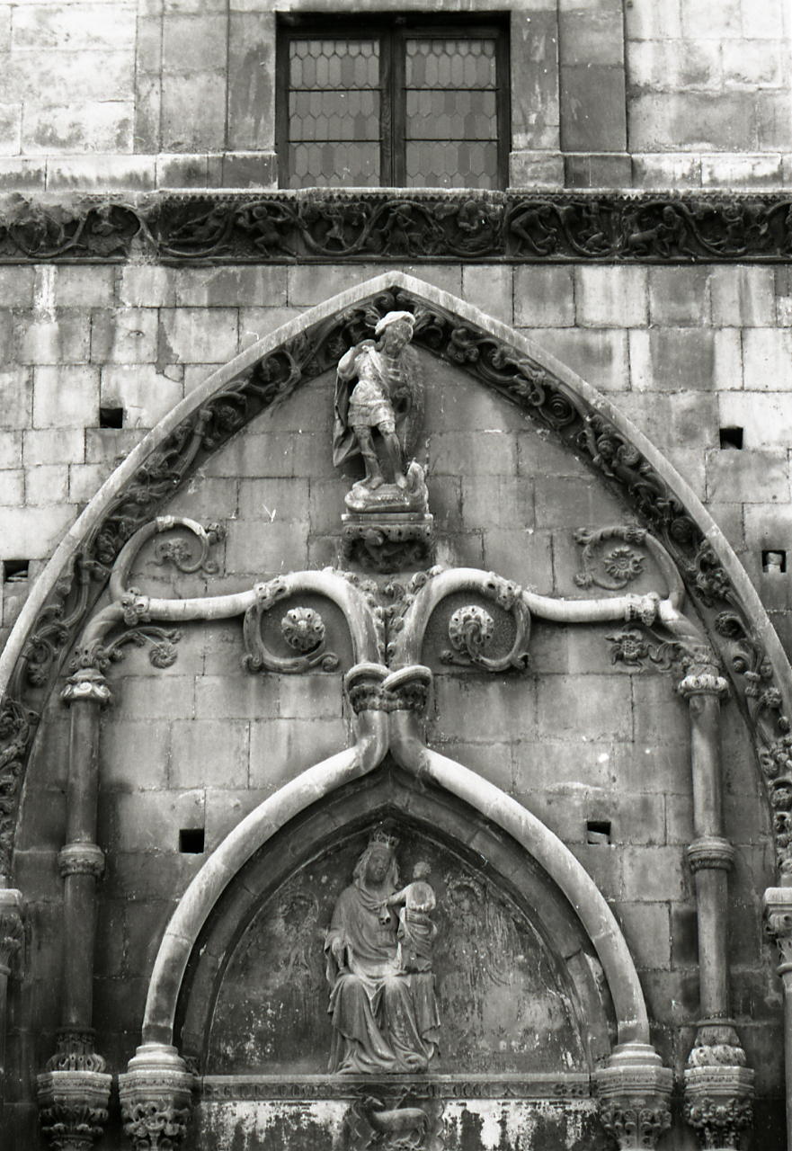 Servizio fotografico : Sulmona, 1969 / Paolo Monti. - Strisce: 3, Fotogrammi complessivi: 15 : Negativo b/n, gelatina bromuro d'argento/ pellicola ; 35 mm. - ((I fotogrammi hanno una doppia numerazione. . - Sul portanegativi: Nikon FP4. - Sul dorso del portanegativi Monti specifica: "Abruzzo.Pietre.". - Occasione: Documentazione per la pubblicazione: "TOURING CLUB ITALIANO, Abruzzo e Molise, Milano, TCI, 1970". - : Monti/ 3 aprile 1966 - 9 marzo 1971/ 12421-16823 (1966-1971), presso Archivio Paolo Monti. - Fonte: Monografia: TOURING CLUB ITALIANO, Abruzzo e Molise, Milano, TCI, 1970 (1970). - Fonte: Agenda di Paolo Monti